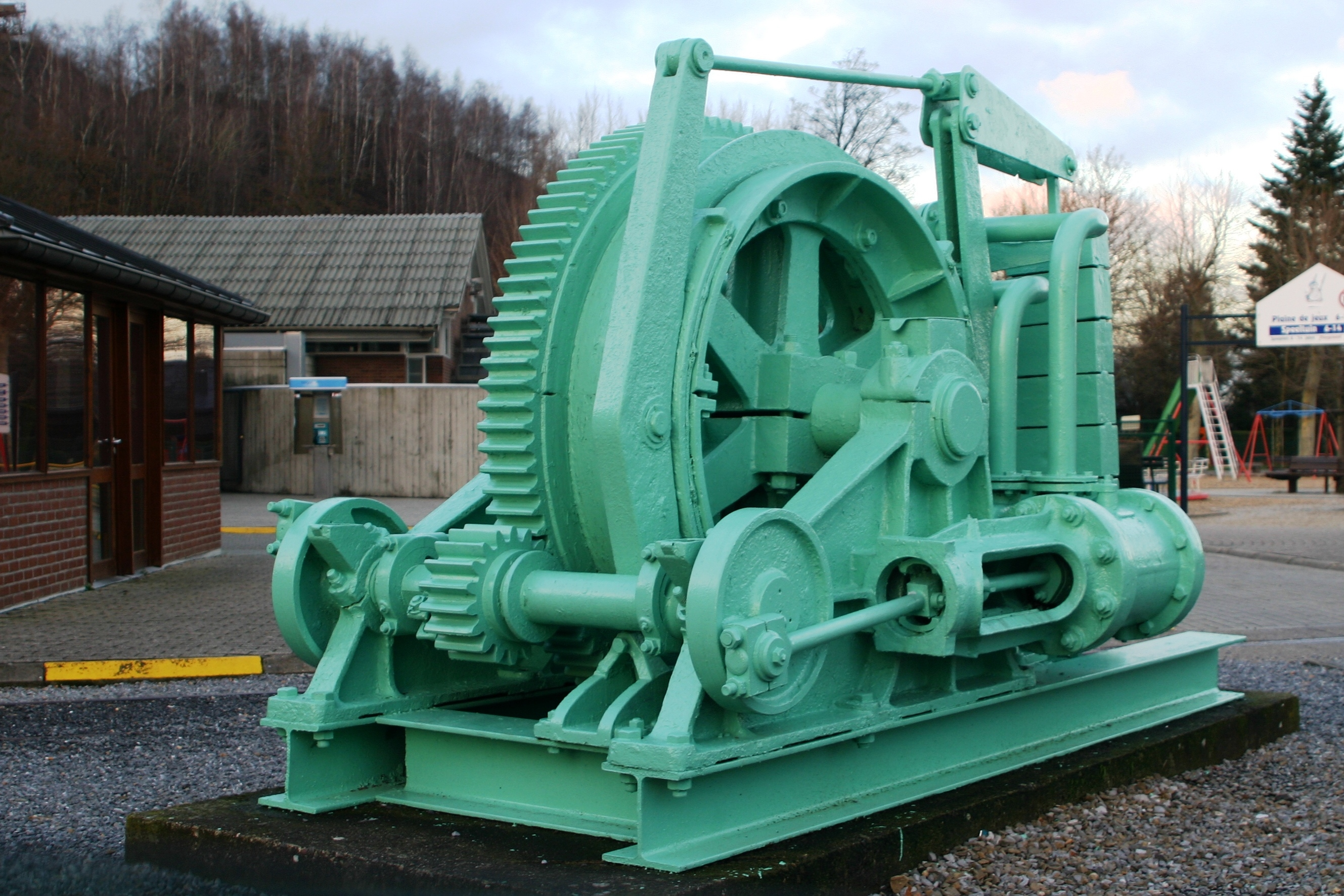 En treuil de burquin am Minnemusée zu Blegny. D'Wann déi vun enger Dampmaschinn ugedriwwe gouf, huet fréier an de Kempense Steenkolenmijnen hiren Déngscht gemaach. Kategorie:Hiefgeschir Kategorie:Blegny